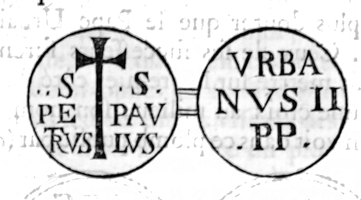 extrait de "Nouveau traité de diplomatique...".